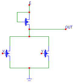 Логический вентиль ИЛИ-НЕ на МОП транзисторах